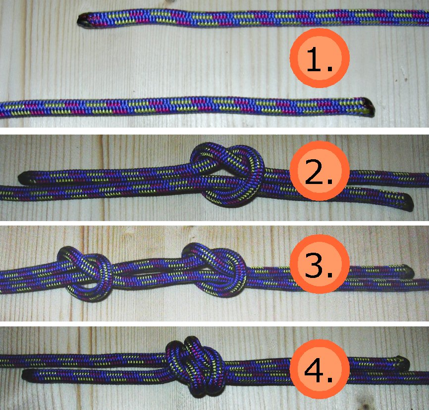 Spierenstich